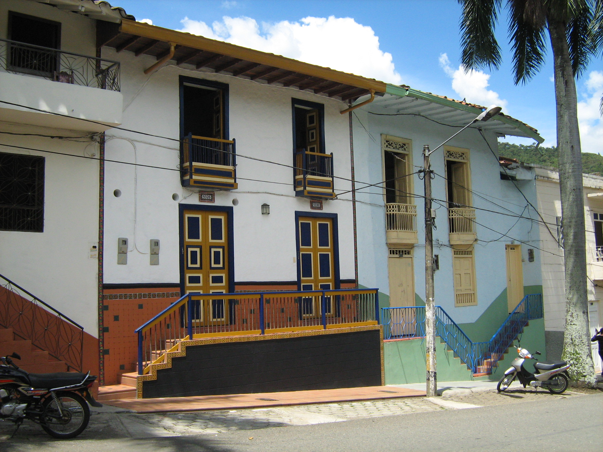 Una casa del Municipio de Ciudad Bolívar, Antioquia, Colombia.